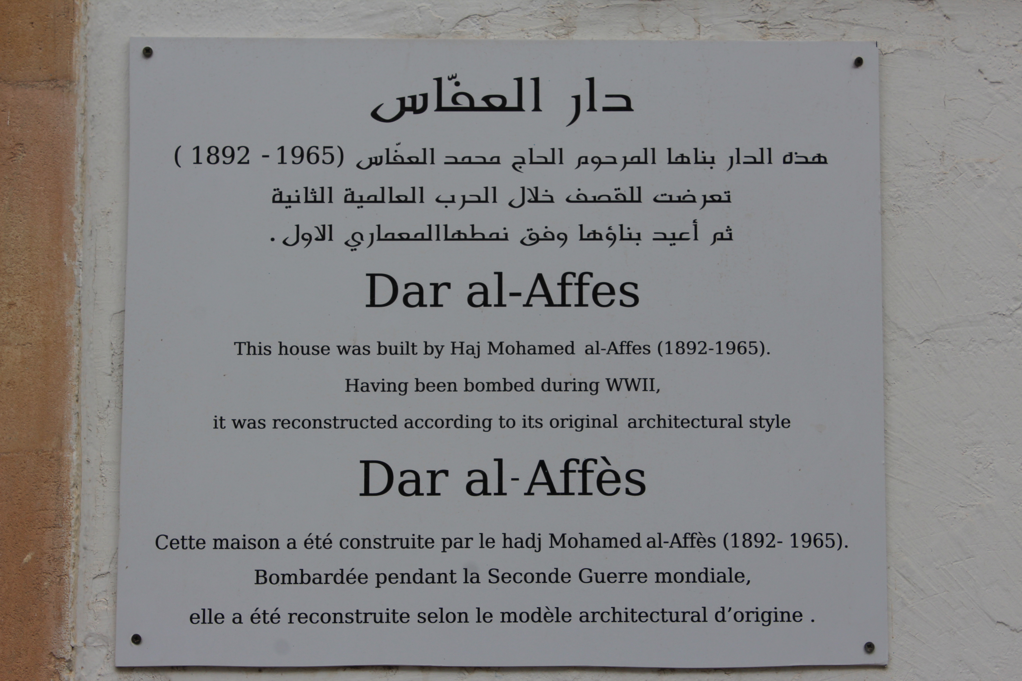 Dar Affes